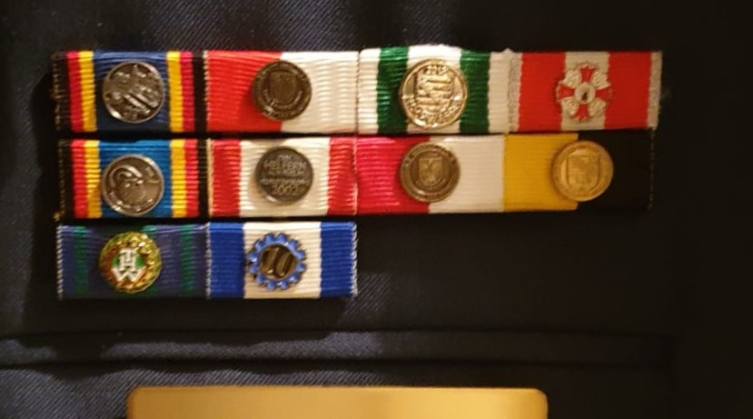 Bandschnallen auf mehrteilige Unterschiene